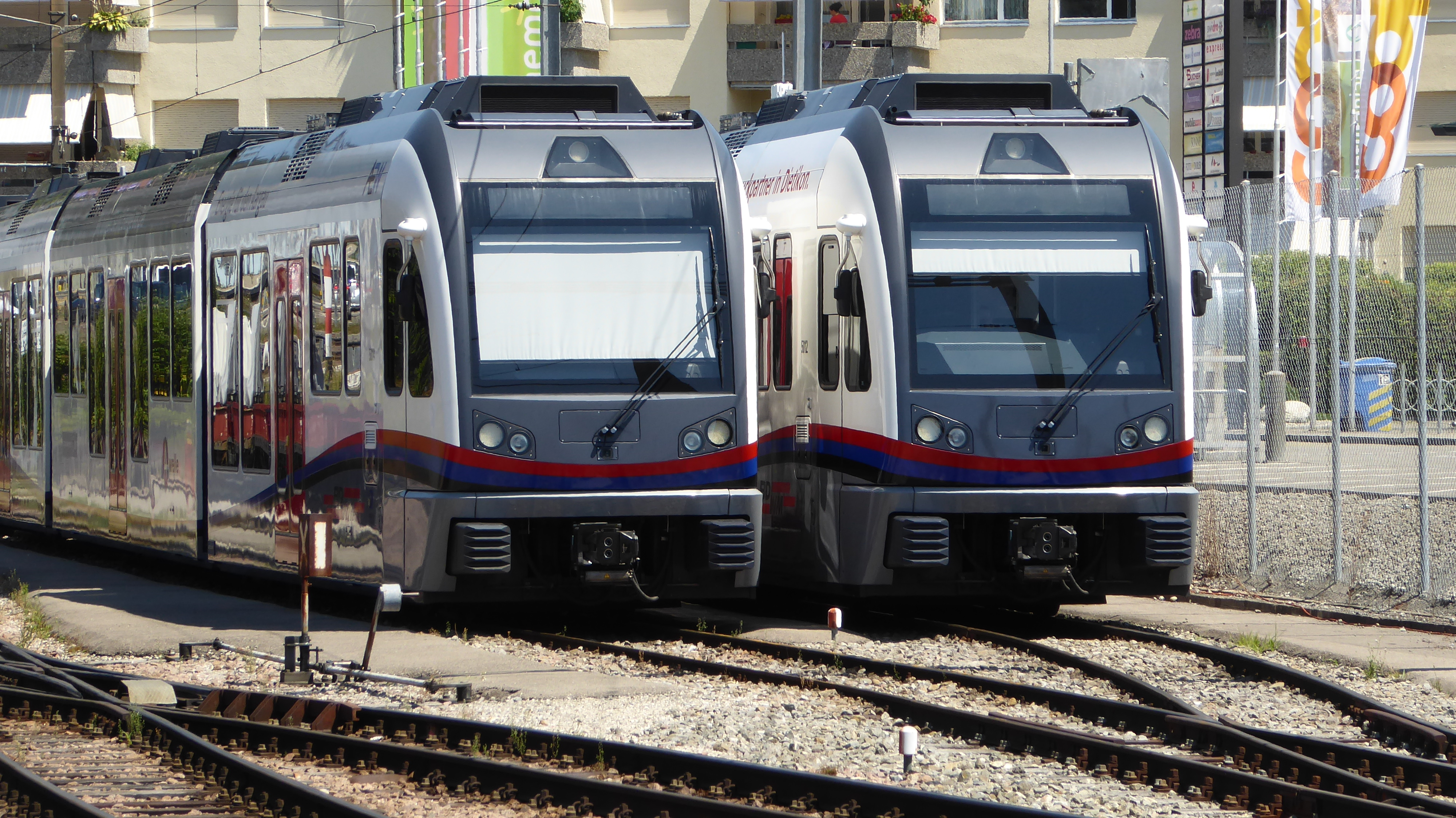 Abgestellte Diamant-Züge der BDWM in Bremgarten